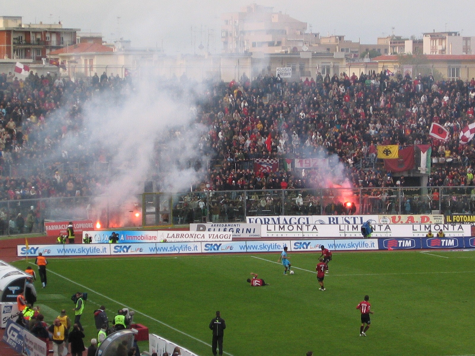 Stadio Armando Picchi, Livorno, Italy - (Livorno - Udinese)